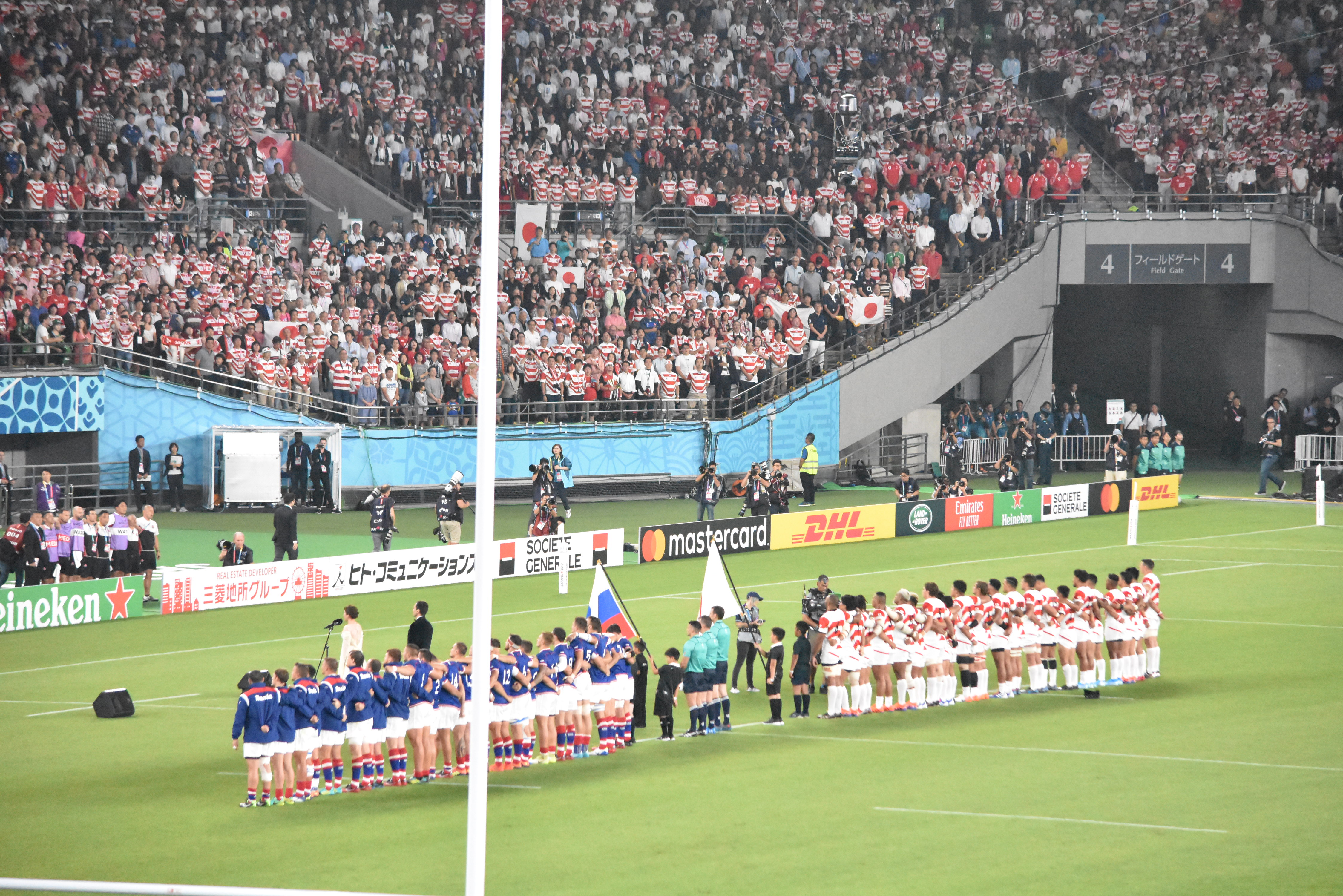 ラグビーワールドカップ